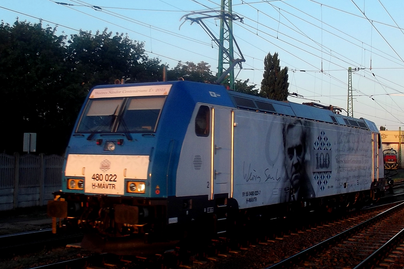 Weöres Sándor TRAXX